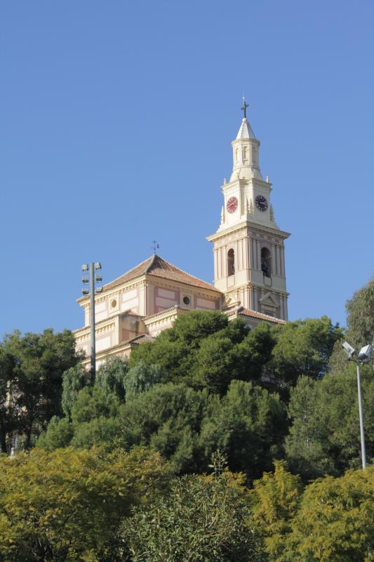 Santuarío de Nuestra Señora de la Cabeza, Motril. A.k.a. el cerro de la Virge.